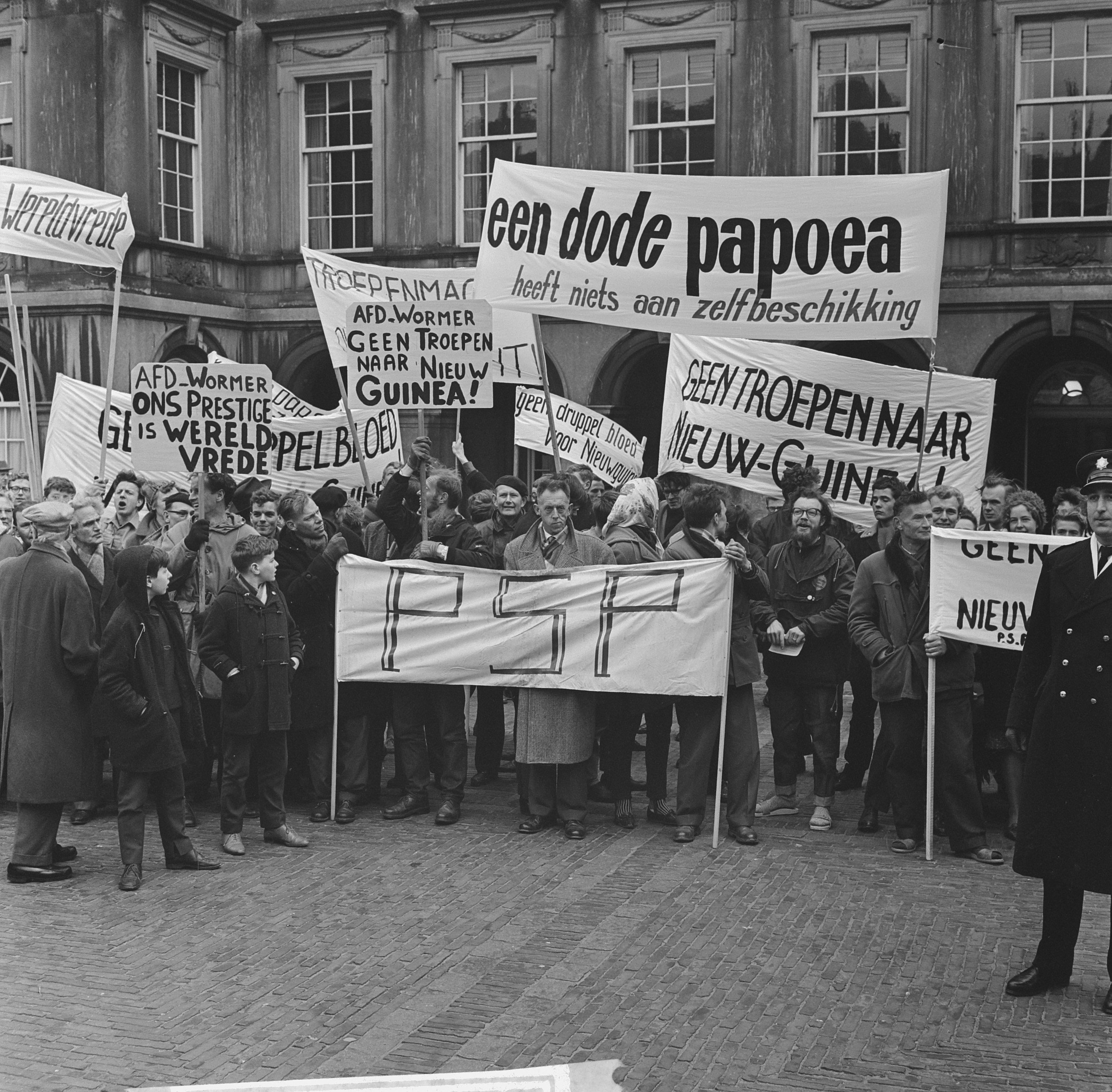 Collectie / Archief : Fotocollectie Anefo Reportage / Serie : [ onbekend ] Beschrijving : PSP-demonstratie in Den Haag Datum : 14 april 1962 Locatie : Den Haag, Zuid-Holland Fotograaf : Koch, Eric / Anefo Auteursrechthebbende : Nationaal Archief Materiaalsoort : Negatief (zwart/wit) Nummer archiefinventaris : bekijk toegang 2.24.01.03 Bestanddeelnummer : 913-7715